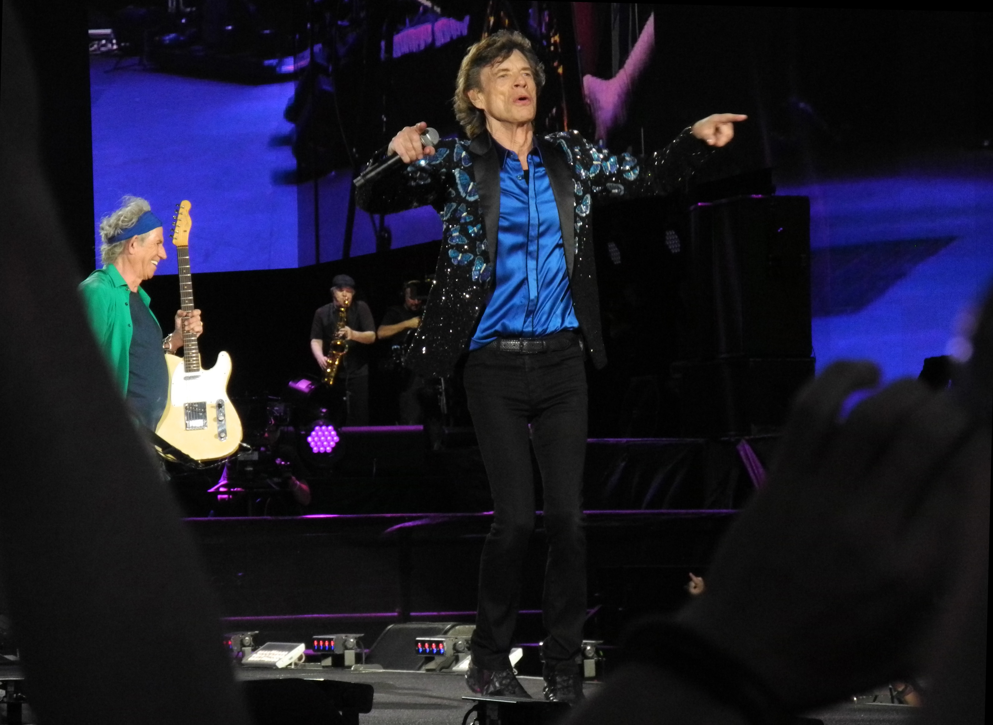 Concerto dei Rolling Stones ad Hyde Park per il tour '50 and counting...' del 2013, Mick Jagger